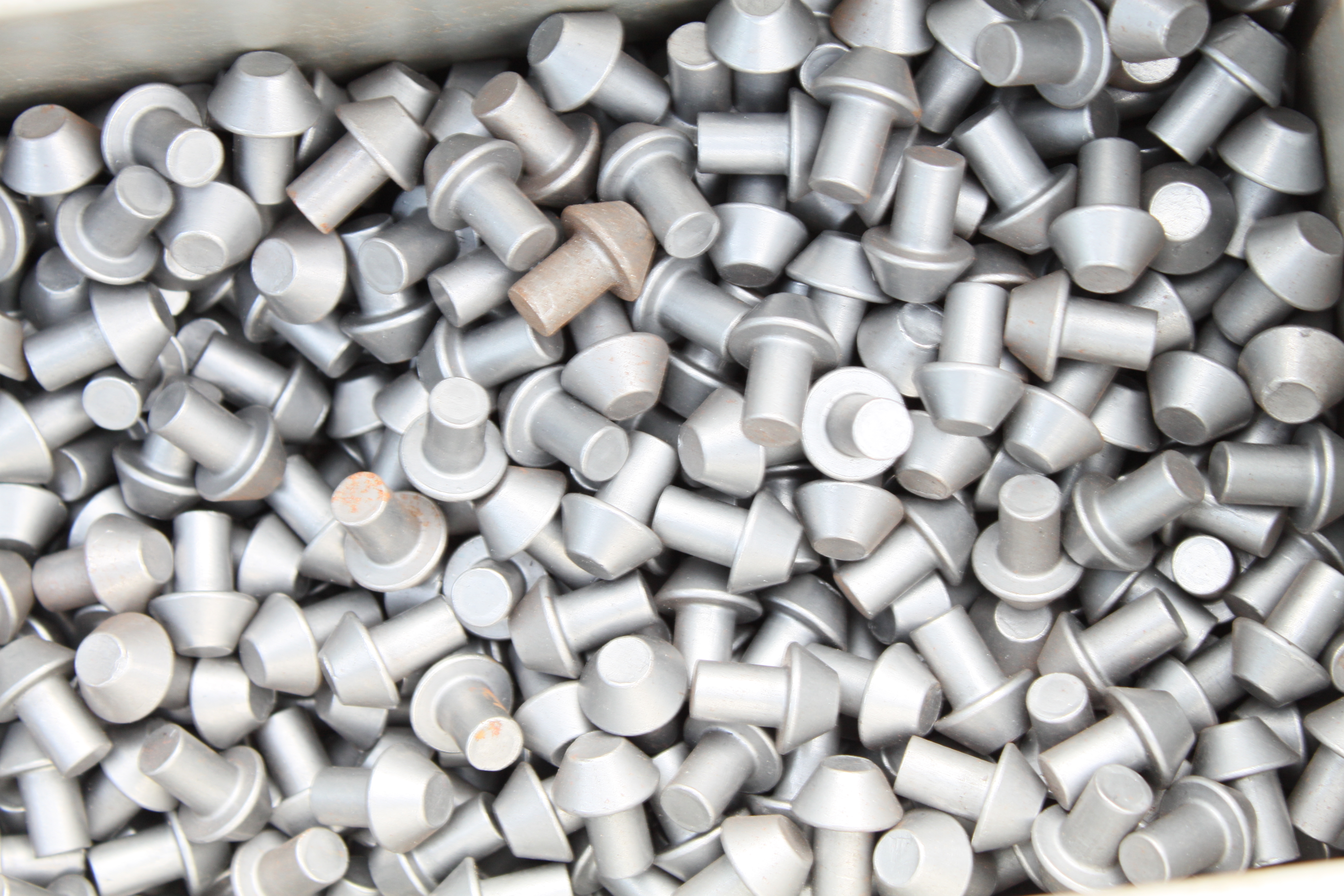 Nieten im Schiffbau , gesehen auf der Messe Bremen "Boot 2011"